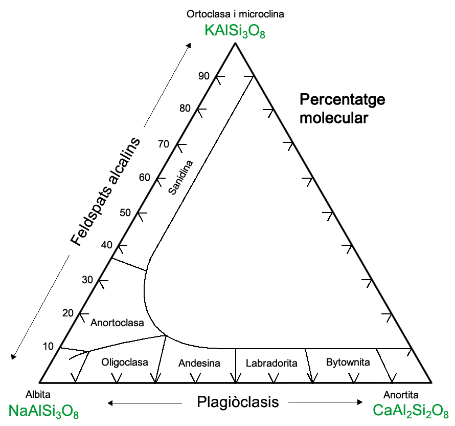 Sistema ternari dels feldspats